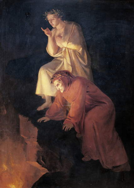 “ En una descripción del cuadro de Rafael Flores, Dante y Virgilio visitando el Infierno, el crítico Roa Bárcena explica a sus lectores: Ya que acabamos de hablar de Dante, comenzaremos nuestra revista de la tercera sala por un notable cuadro original de don Rafael Flores, y que representa a Dante y Virgilio visitando el infierno. El artista debe haber comprendido la sublimidad de aquel pasaje de la Divina Comedia, en el qual el primero de dichos poetas es conducido por el segundo, al través de rocas y precipicios, hasta la caverna donde los malos consejeros son atormentados por las llamas. Virgilio, colocado en la parte superior del cuadro, pide a Ulises que refiera la historia de su naufragio, y el Dante, apoyado en el bordo del abismo, y con la faz descompuesta por el terror, presta oído a las palabras de Ulises. Hay que notar en la actitud y el rostro de Virgilio la serenidad causada por lo antiguo de su conocimiento con las almas entregadas a las penas eternas, y en la actitud y el rostro de Dante Alighieri el espanto que le ocasiona la novedad de escena tan horrible. Ambos personajes están laureados y la fisonomía del Dante perfectamente conservada, siendo de sentirse que la de Virgilio no sea más aguileña, como la representan las más antiguas medallas. La luz del fuego en que abrasan los precitos, domina en todo el cuadro, estando tan perfectamente caracterizada, que, por un engaño muy común a nuestros sentidos, experimentamos calor al acercarnos al lienzo, y la vista no puede detenerse en él mucho tiempo sin lastimarse. Las actitudes, los rostros, los ropajes y hasta los complicados juegos de luz que se notan, especialmente en la figura del autor de la Eneida, revelan sumo gusto y un estudio exraordinario de parte del artista, quien obtuvo el segundo premio en la clase de composición de pocas figuras. ” —Ida Rodríguez Prampolini, "La crítica de arte en México en el siglo XIX", UNAM, [1964¹] 1997², Google Books, p. 56 y p. 424